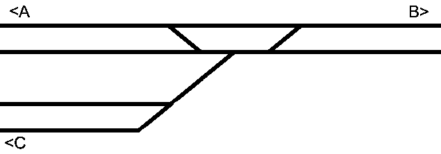 大肚溪南號誌站軌道配置圖，A方向通往成功，B方向通往彰化，C方向通往追分